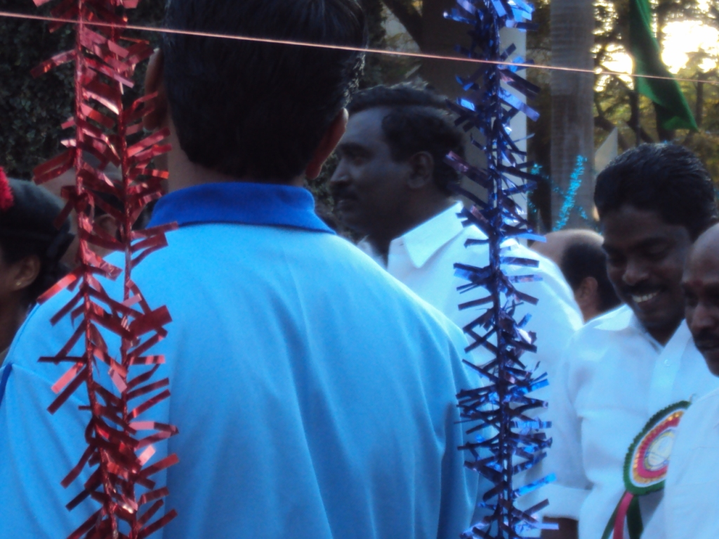 தமிழக பால்வளத்துறை அமைச்சர் மூர்த்தி - நடுவில் உயரமாக இருப்பவர்.